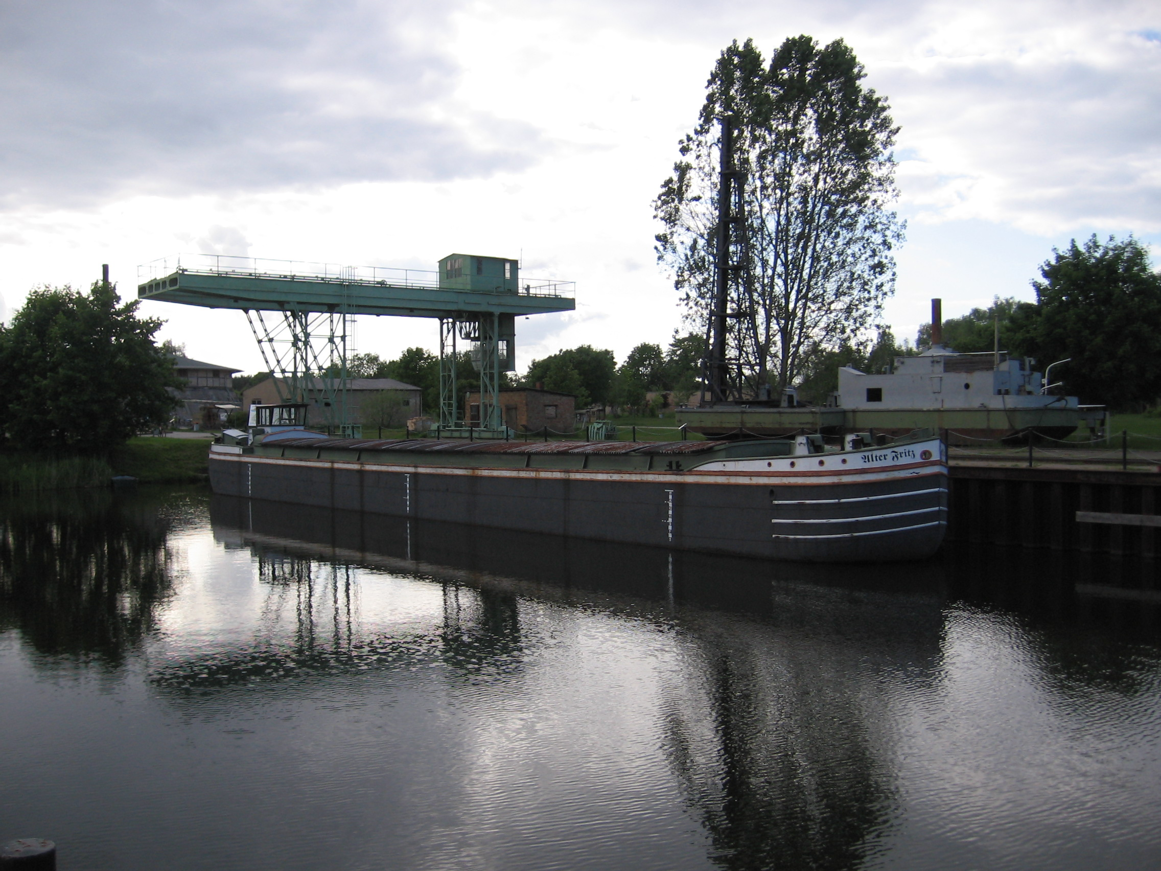 Finow-Maßkahn „Alter Fritz“im Ziegeleihafen Mildenberg